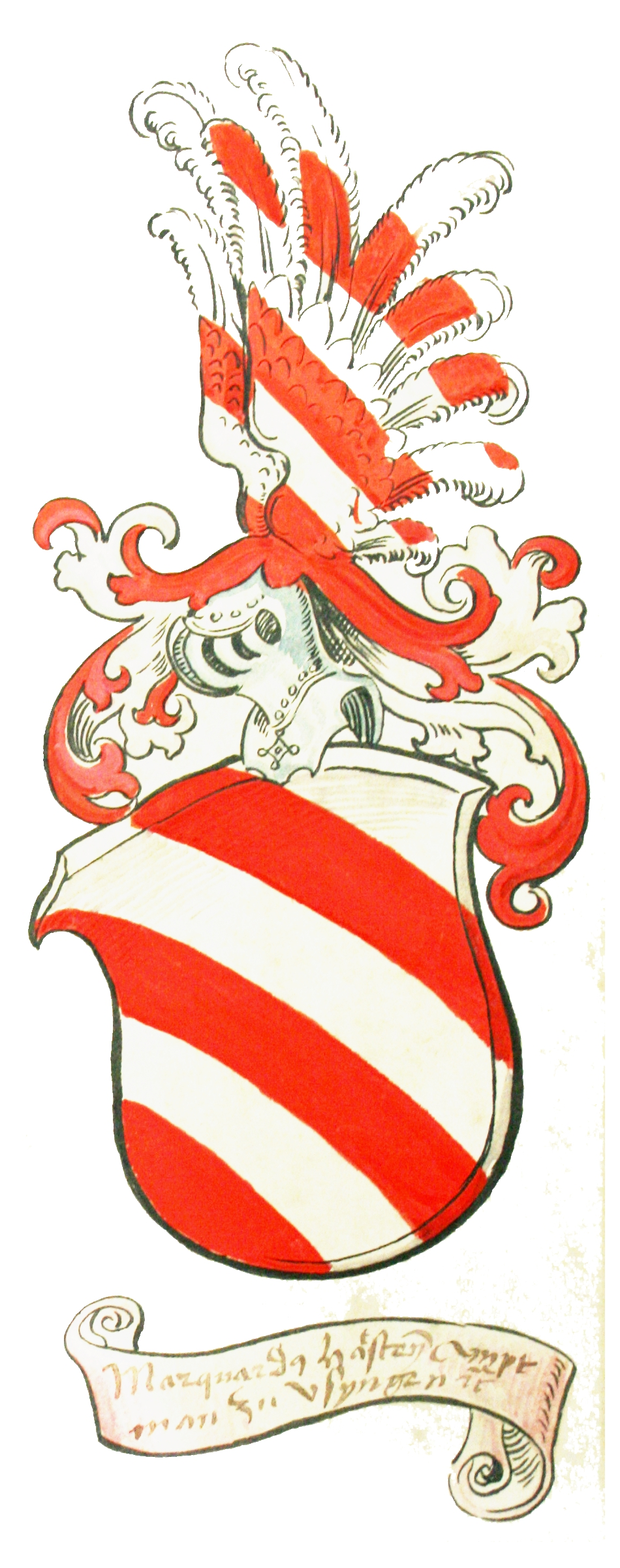 Wappen des Friedberger Burgmann Marquart von Hattstein im Salbuch des Kloster Naumburg, Buchmalerei des 16. Jahrhundert.